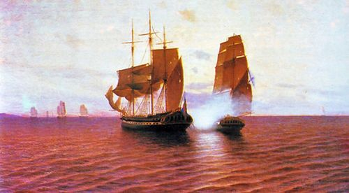 И. Федоров. Захват катером «Меркурий» шведского фрегата «Венус» 21 мая 1789 г. Холст. Масло. 90*142